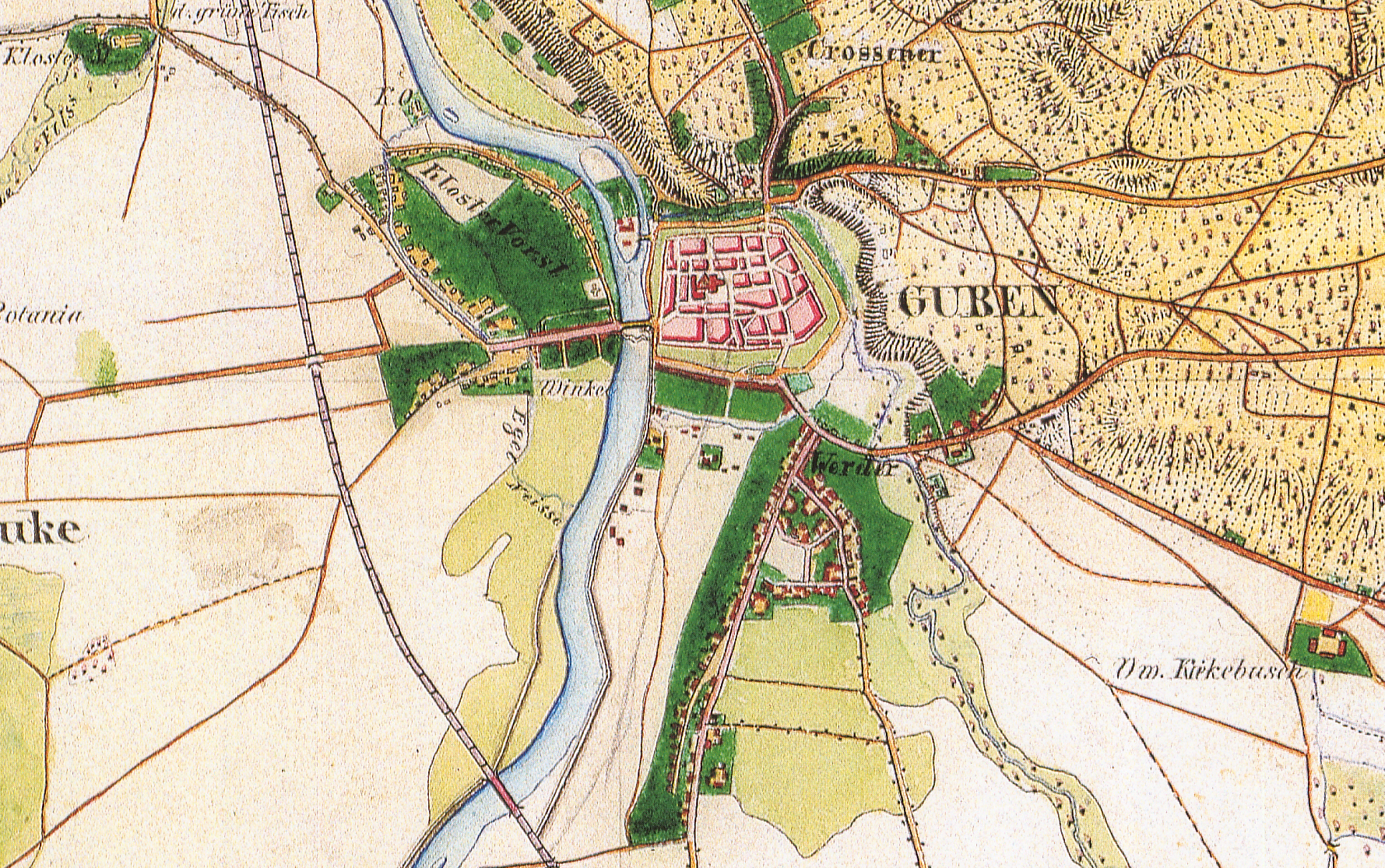 Guben, Landkreis Spree-Neiße, Brandenburg, Ausschnitt aus dem Urmesstischblatt 4054 Guben von 1845